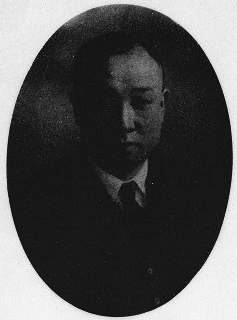 三代目本間金之助（1897～？）